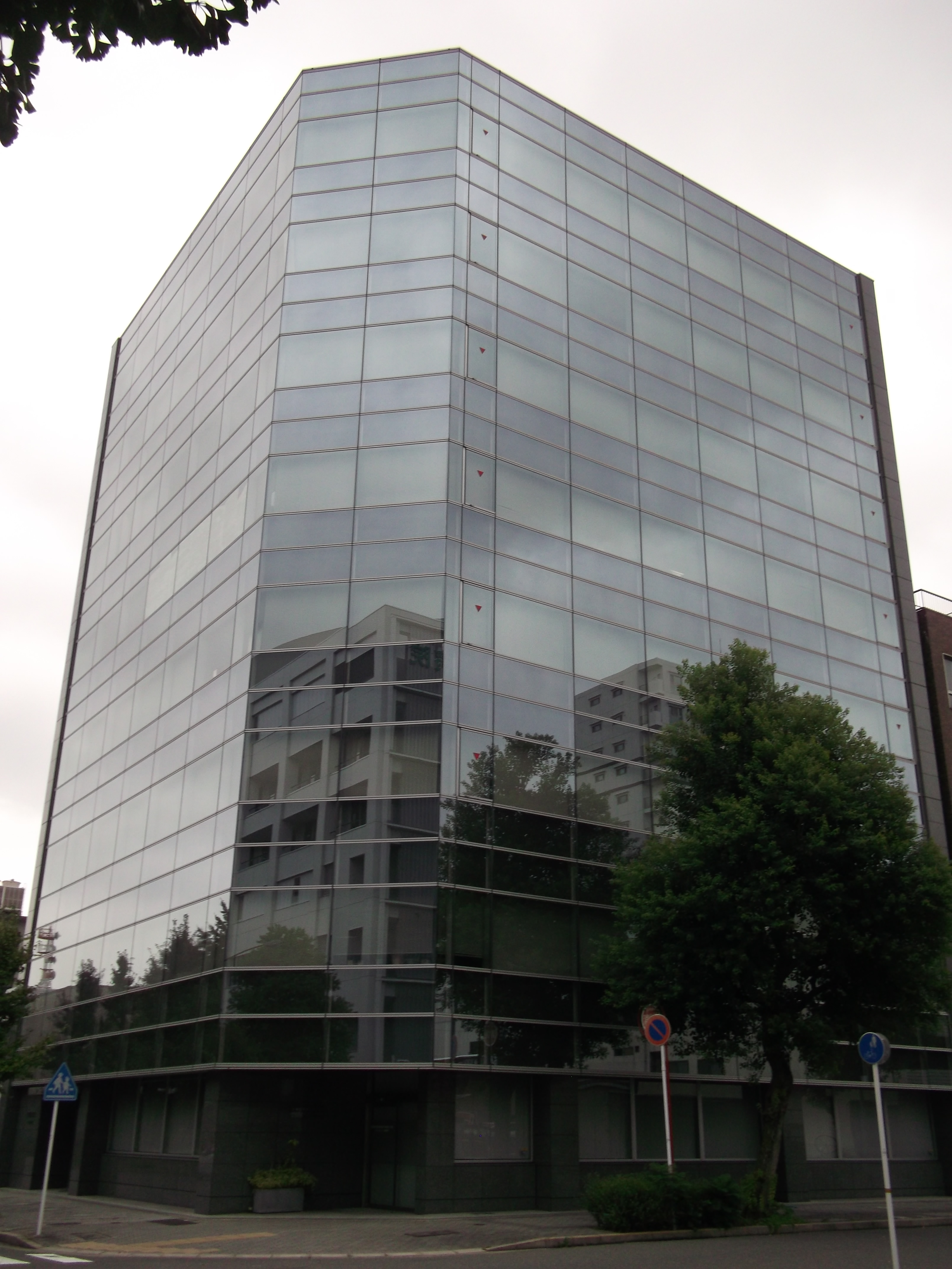 名古屋市中区のヤガミビルを南西角公道より撮影